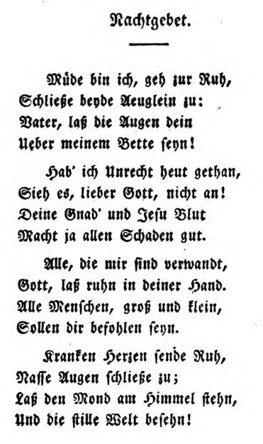 Luise Hensel: Nachtgebet - Müde bin ich, geh zur Ruh, Druckfassung 1829